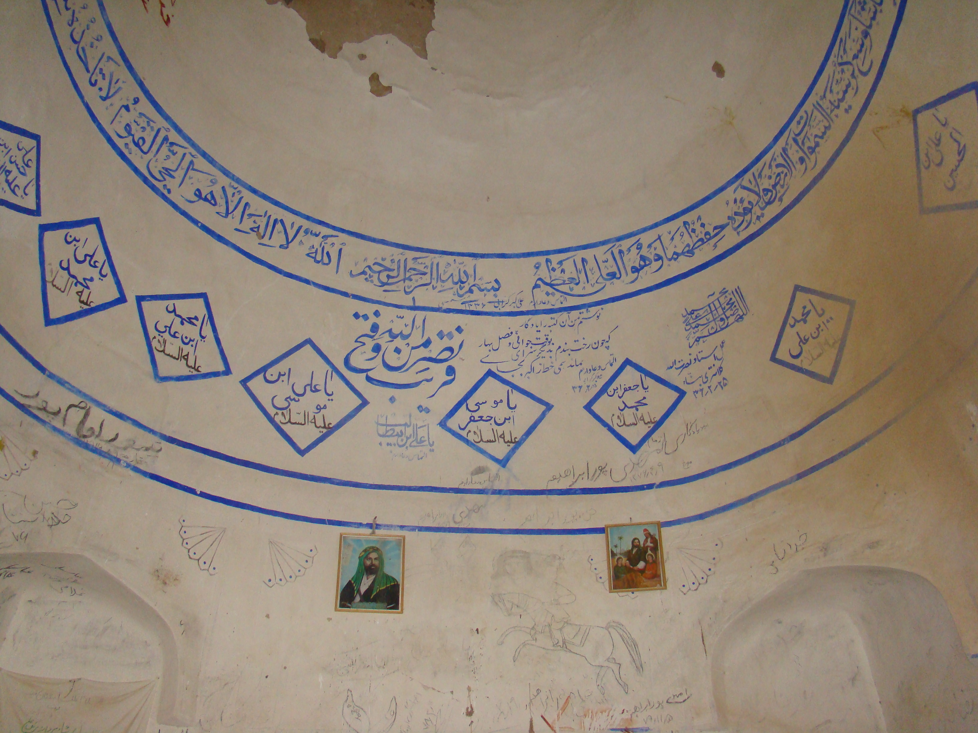 نقاشی و خوشنویسی در داخل بنای امامزاده سلطان مصیب